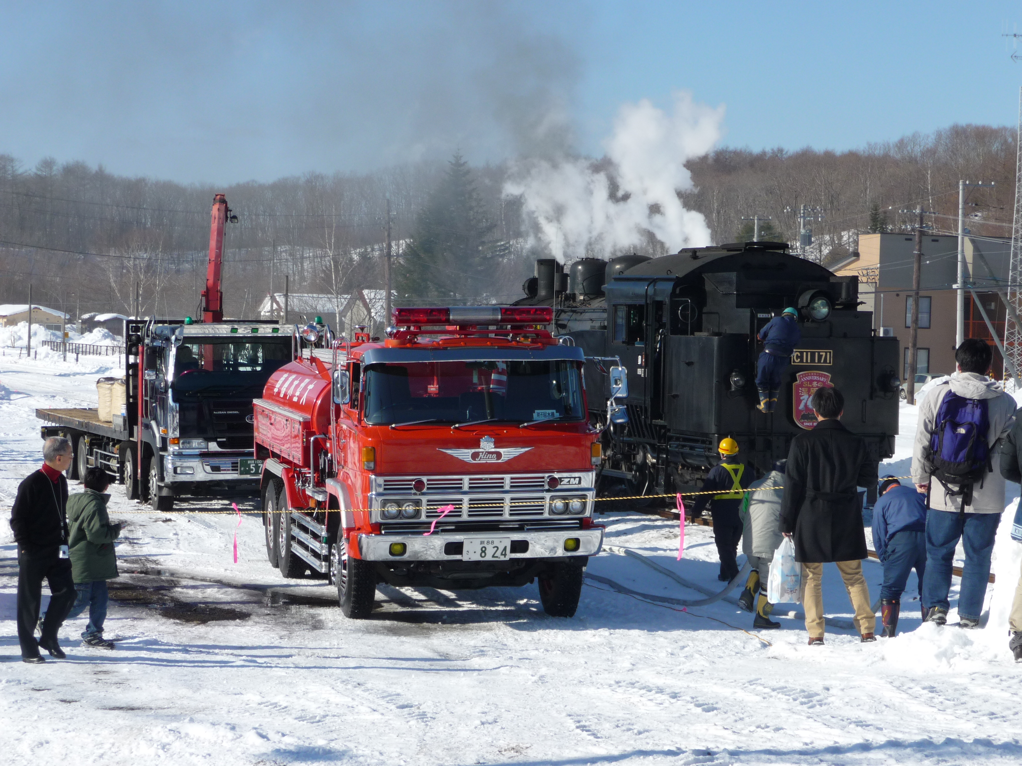 摩周駅で給水を受けるC11 171。